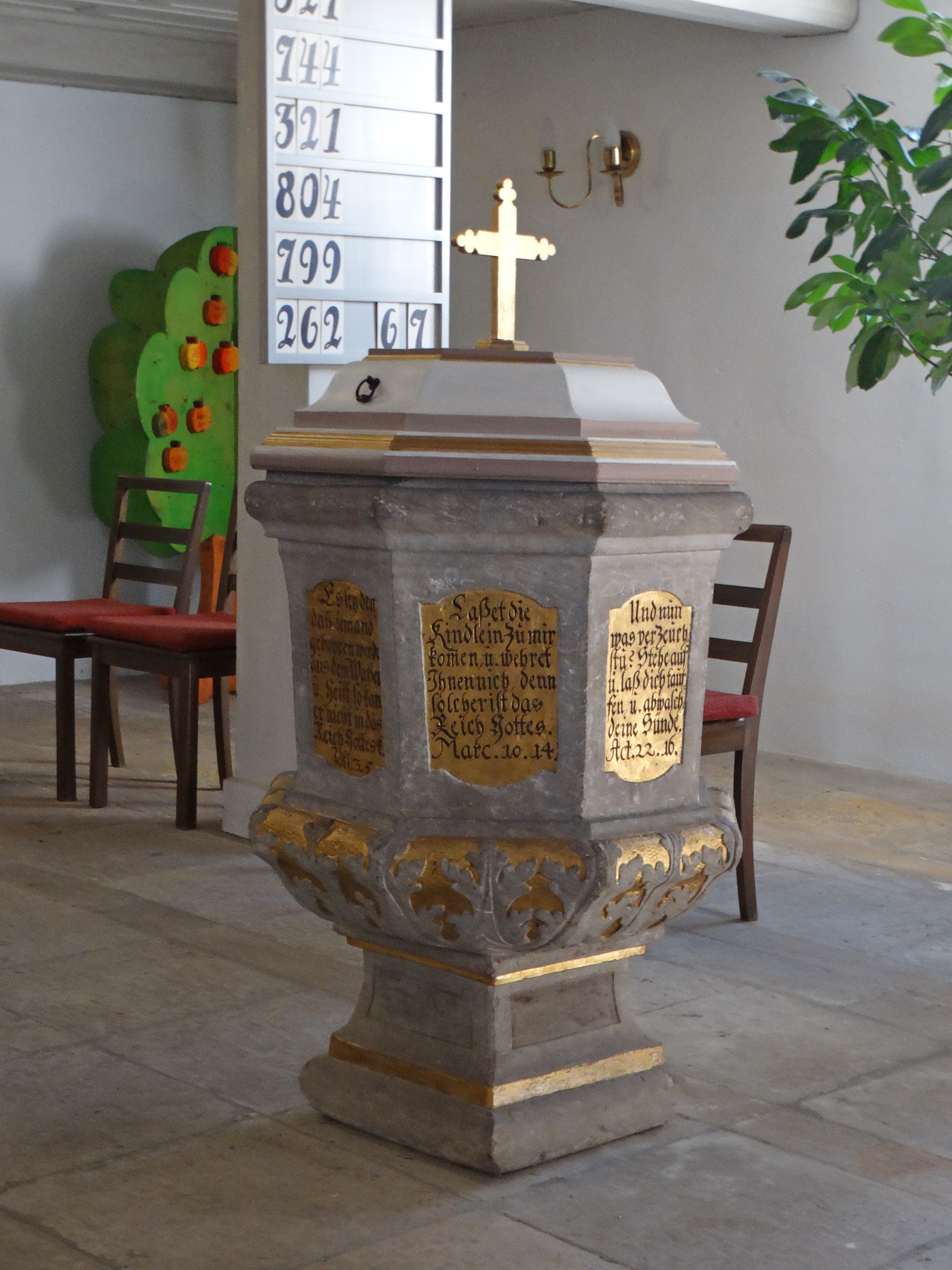 Achteckiger Taufstein mit Bibelsprüchen von 1723